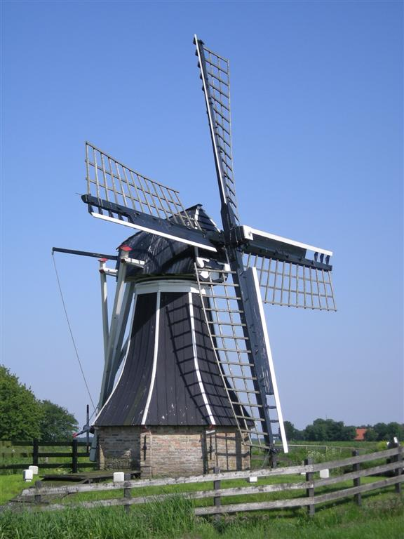 De Tjongermolen in Mildam bij de rivier de Tjonger